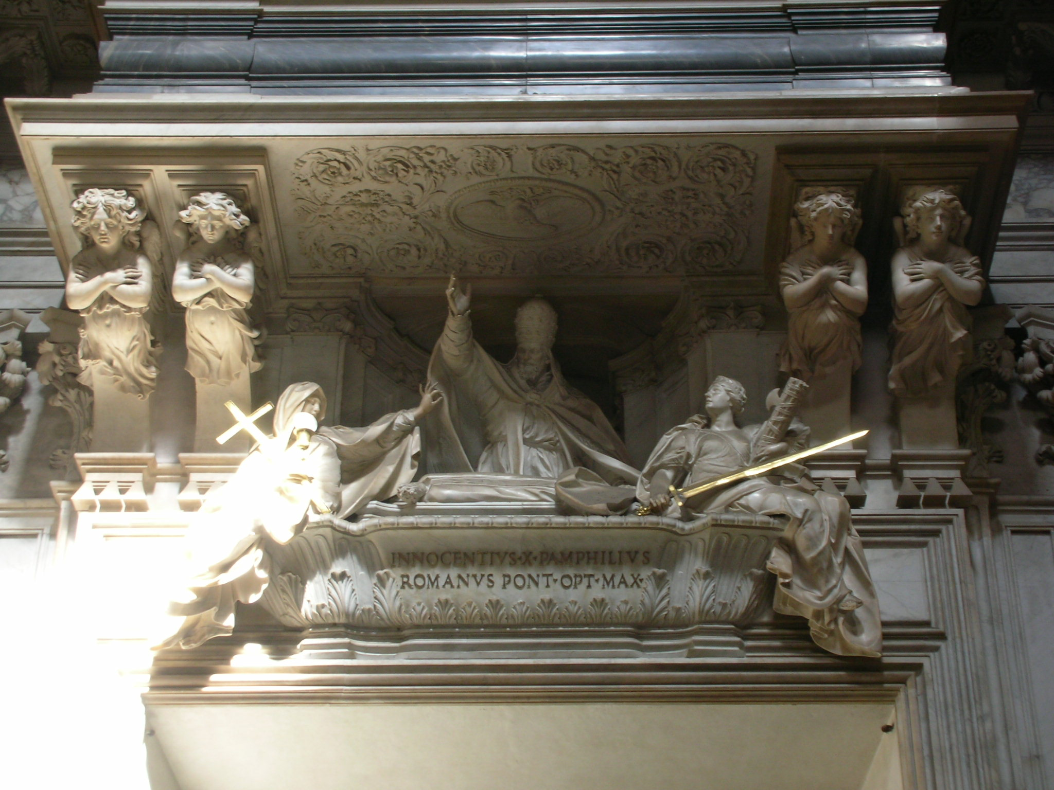 Monumento to Pope Innocenzo X, Sant'Agnese in Agone, Rome